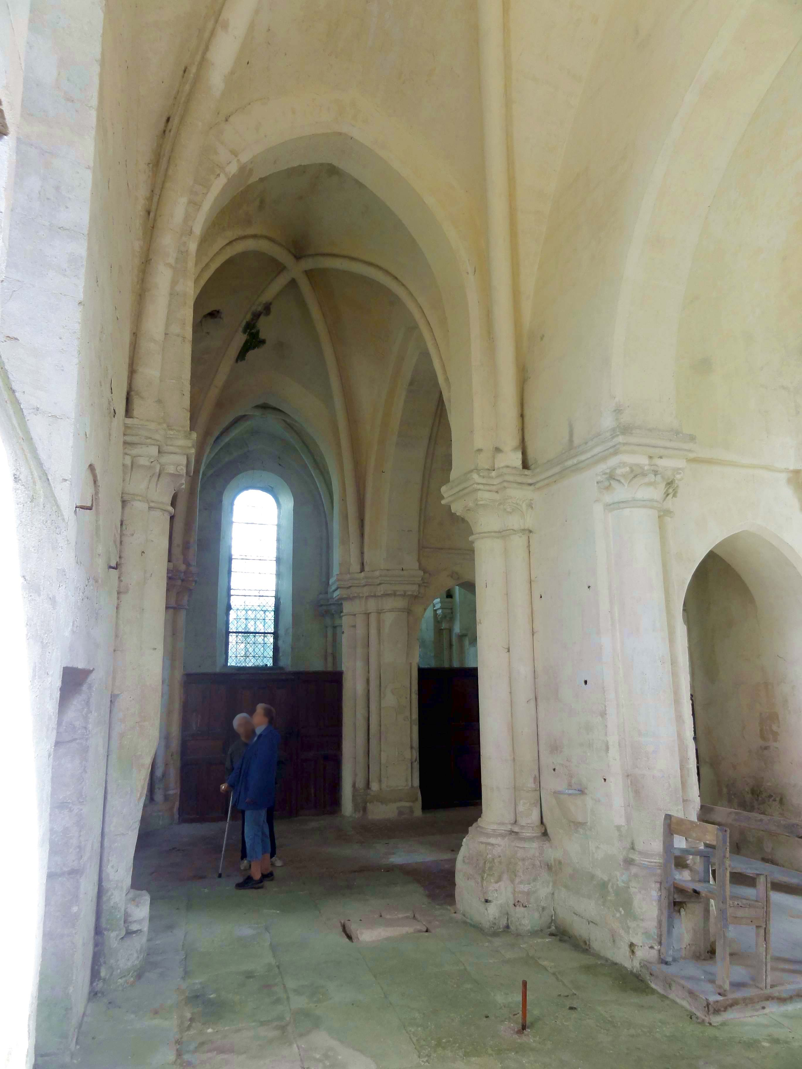 Intérieur de l'église - voir titre.